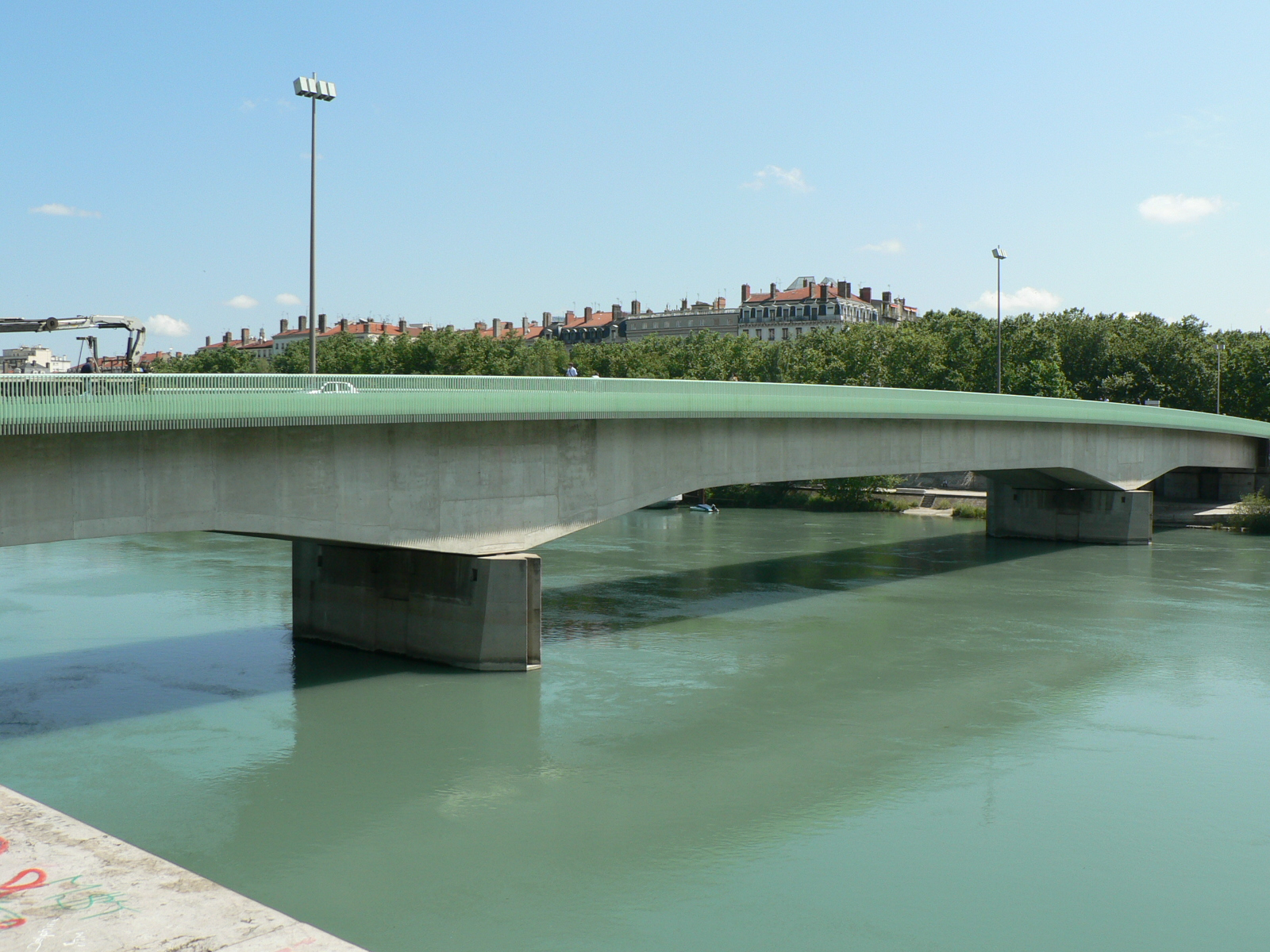 Ponts de Lyon – Pont Morand